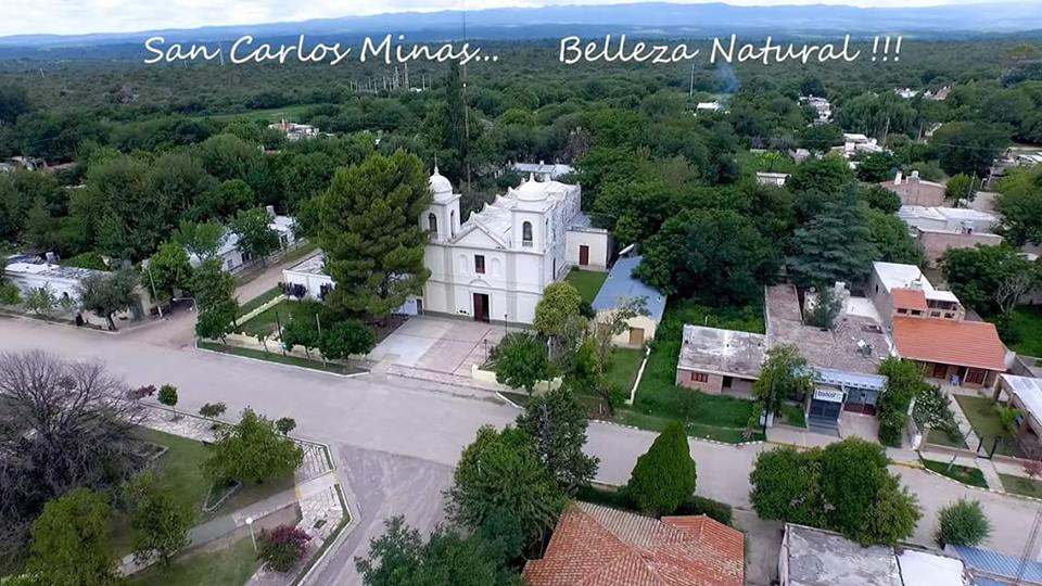 Iglesia Inmaculada Concepción de Maria. San Carlos Minas, Córdoba, Argentina.